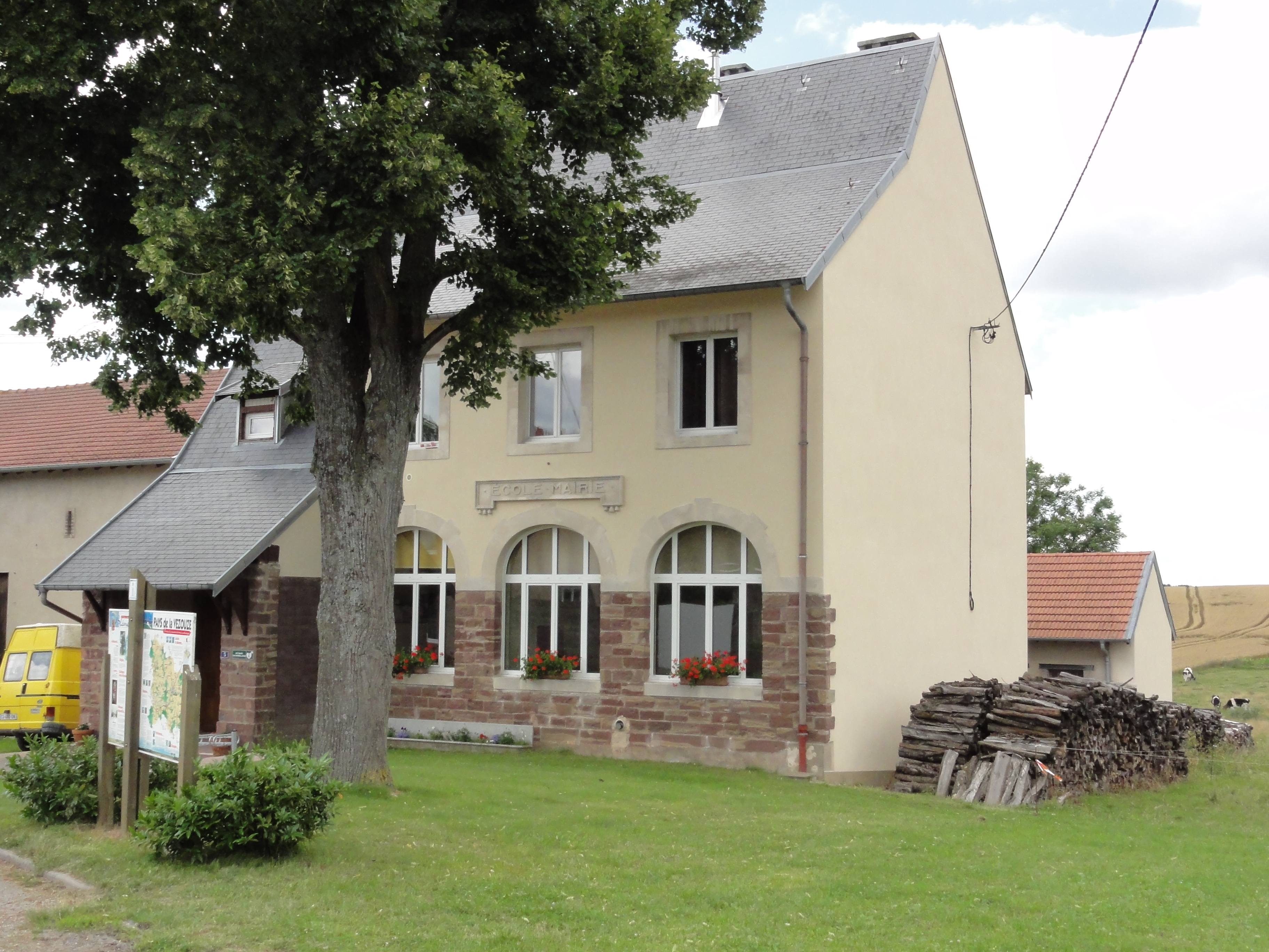 Blémerey (M-et-M) mairie - école